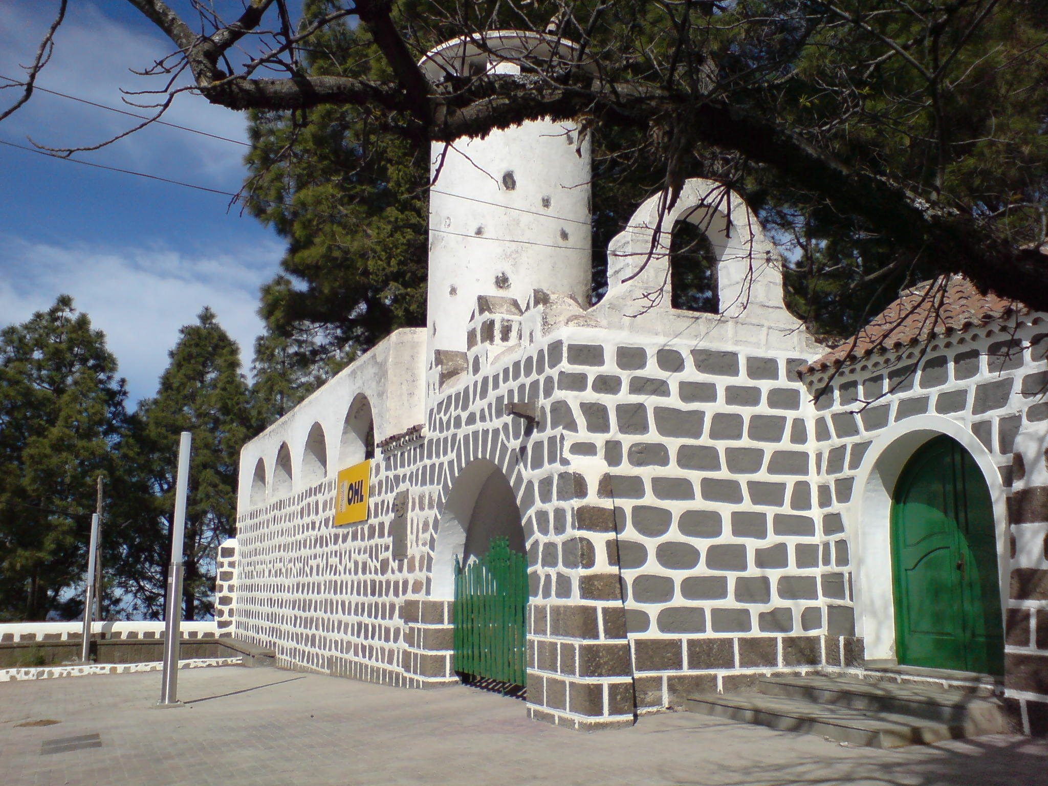 Acceso principal al Parador de Cruz de Tejeda, San Mateo, Gran Canaria. Después de las obras de reforma. La Cruz de Tejeda, ofrece una de las más relajantes vistas de la Isla. Una gran cruz de piedra preside la entrada del Parador Nacional, a pocos metros de la cual numerosos puestos de venta de productos típicos de la zona hacen las delicias de los visitantes.